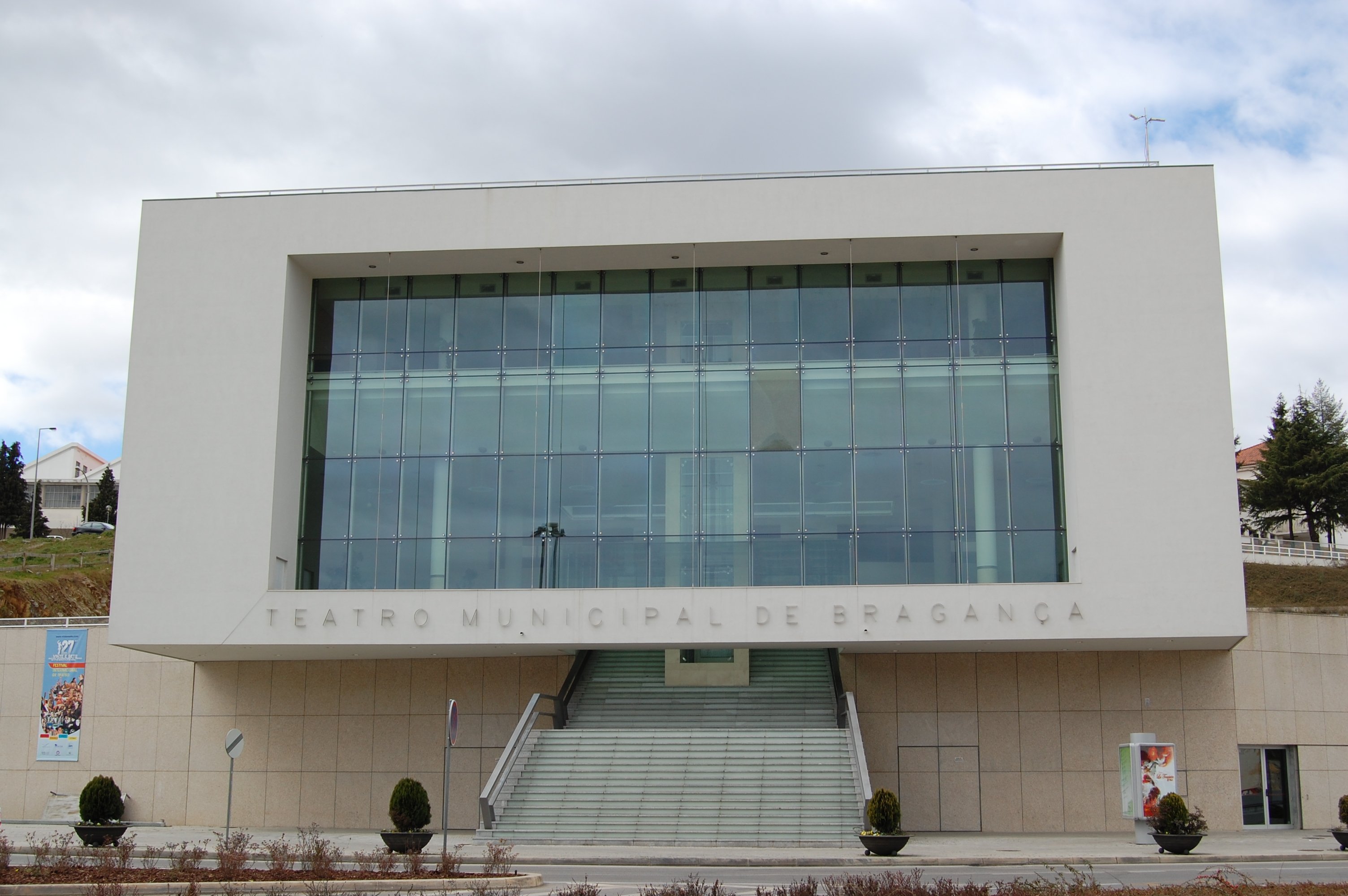 O Teatro Municipal de Bragança, no nordeste de Portugal.